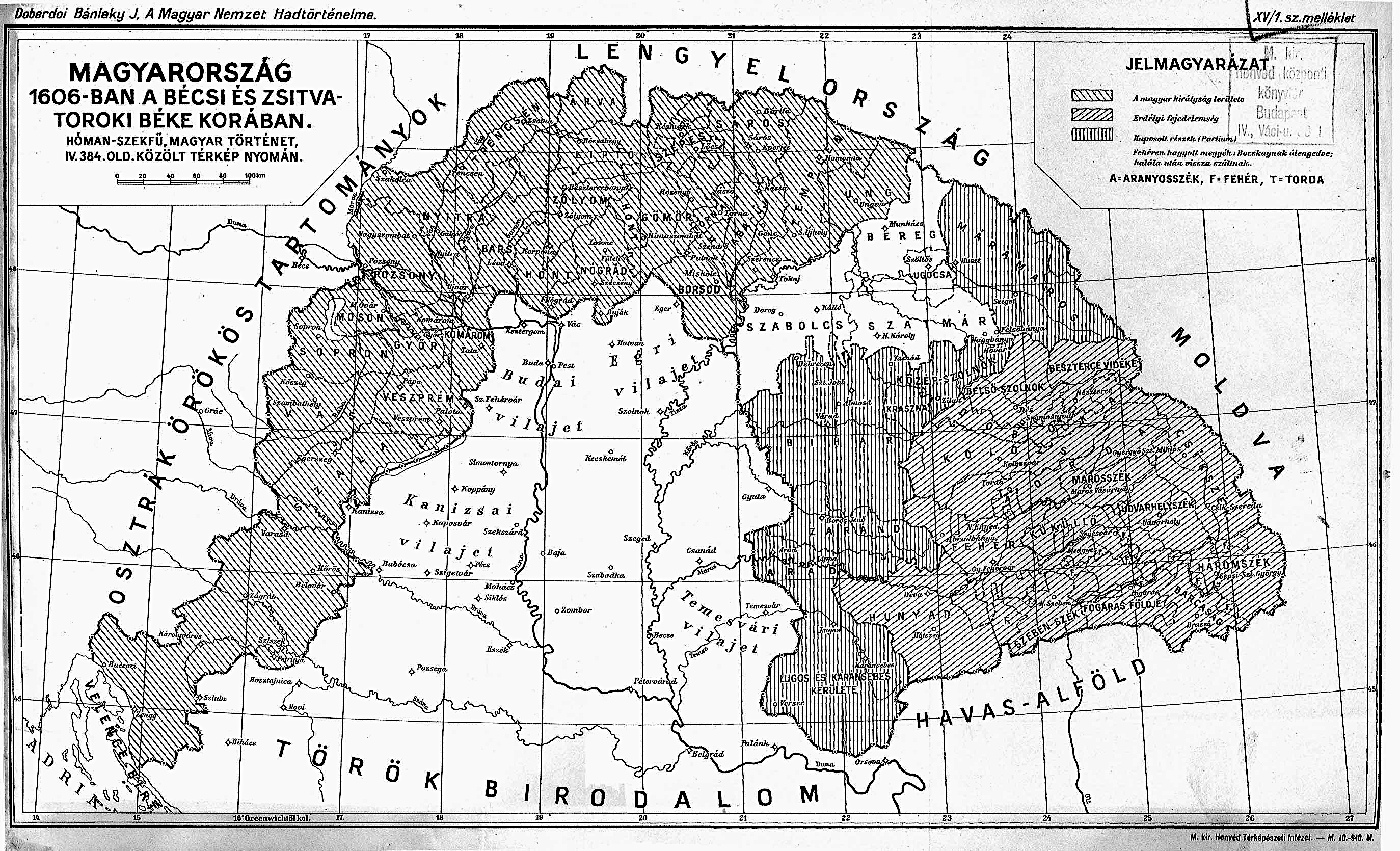 Magyarország 1606-ban a bécsi és zsitvatoroki béke korában